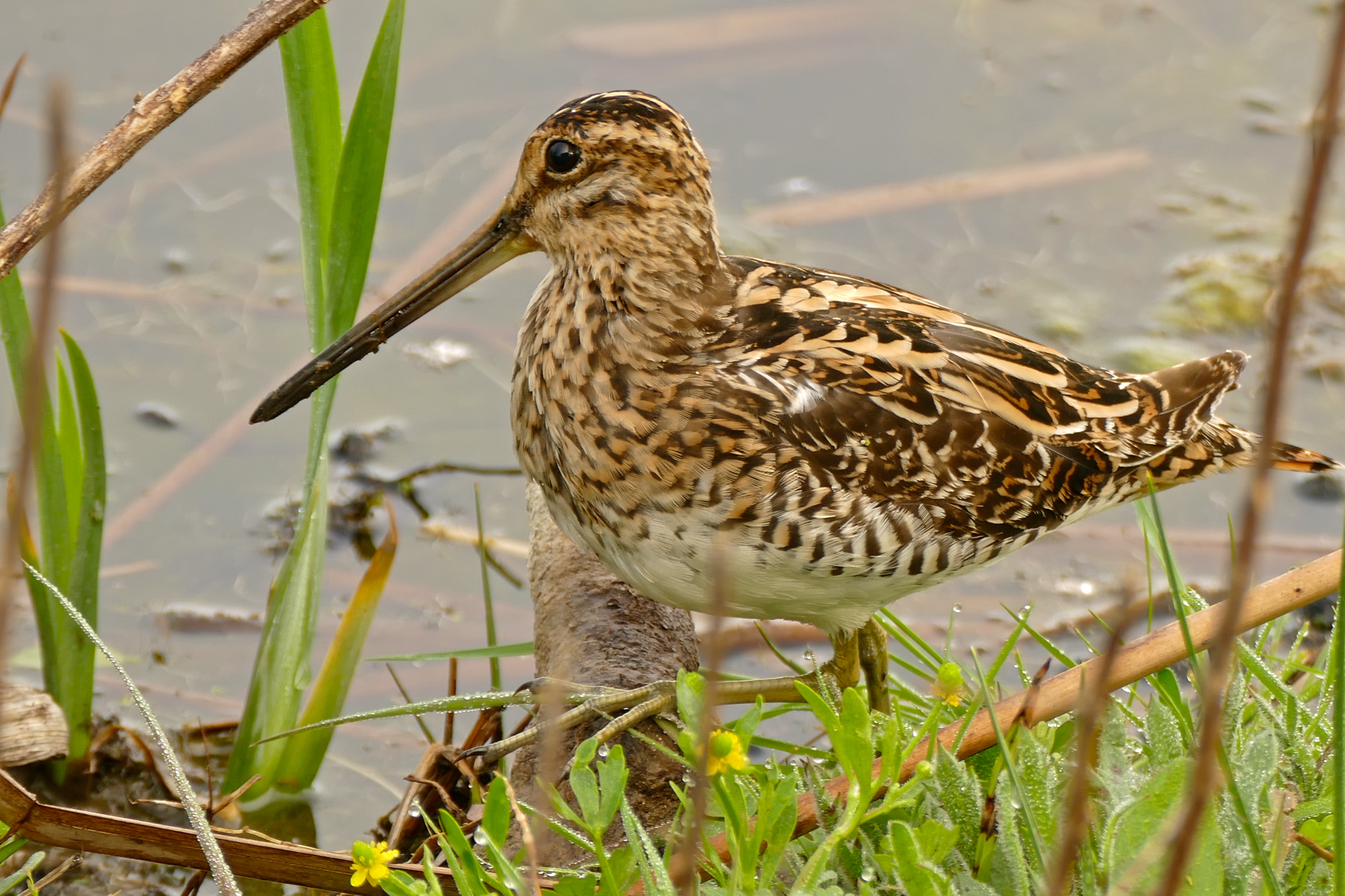 Aguait dels Capons, Estany Europa, Los Aiguamolls del' Empordà, Castelló d'Empúries, Catalunya, SPAIN